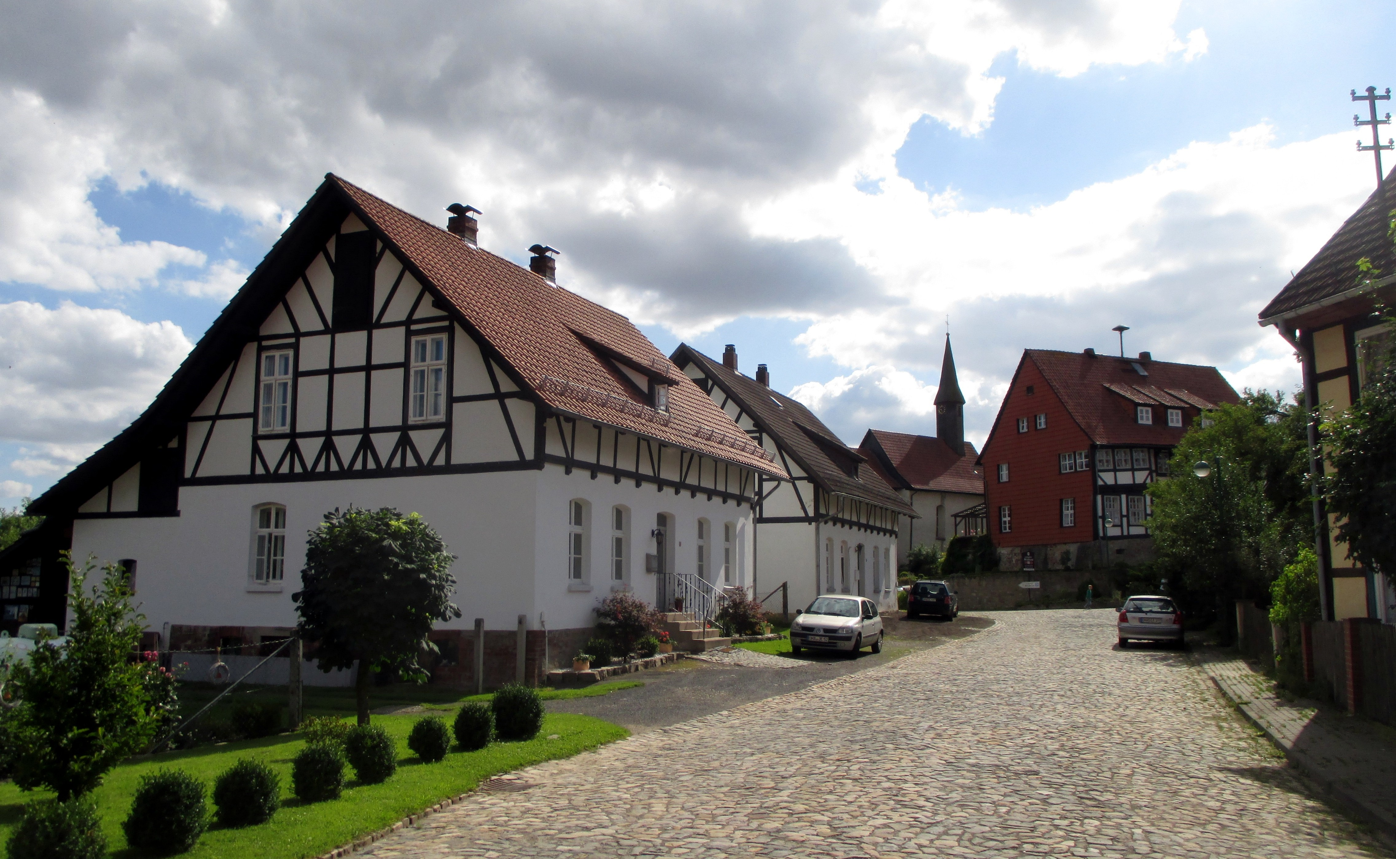 Ortskern des Stadtdorfs Uehrde, Stadt Osterode am Harz